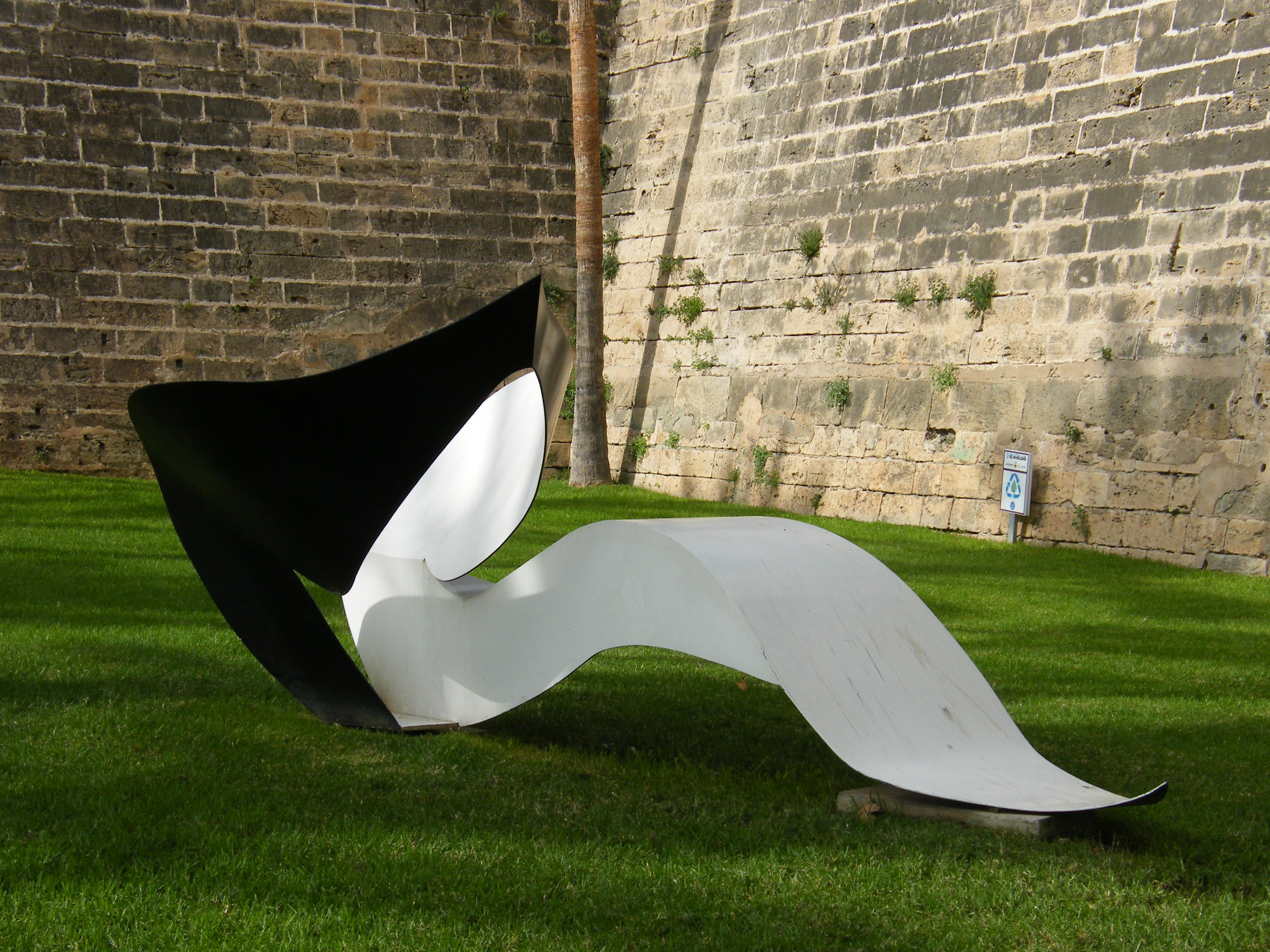 Sculpture Negro y blanco horizontal (1993/99) by George Sugarman in Palma de Mallorca/Spain